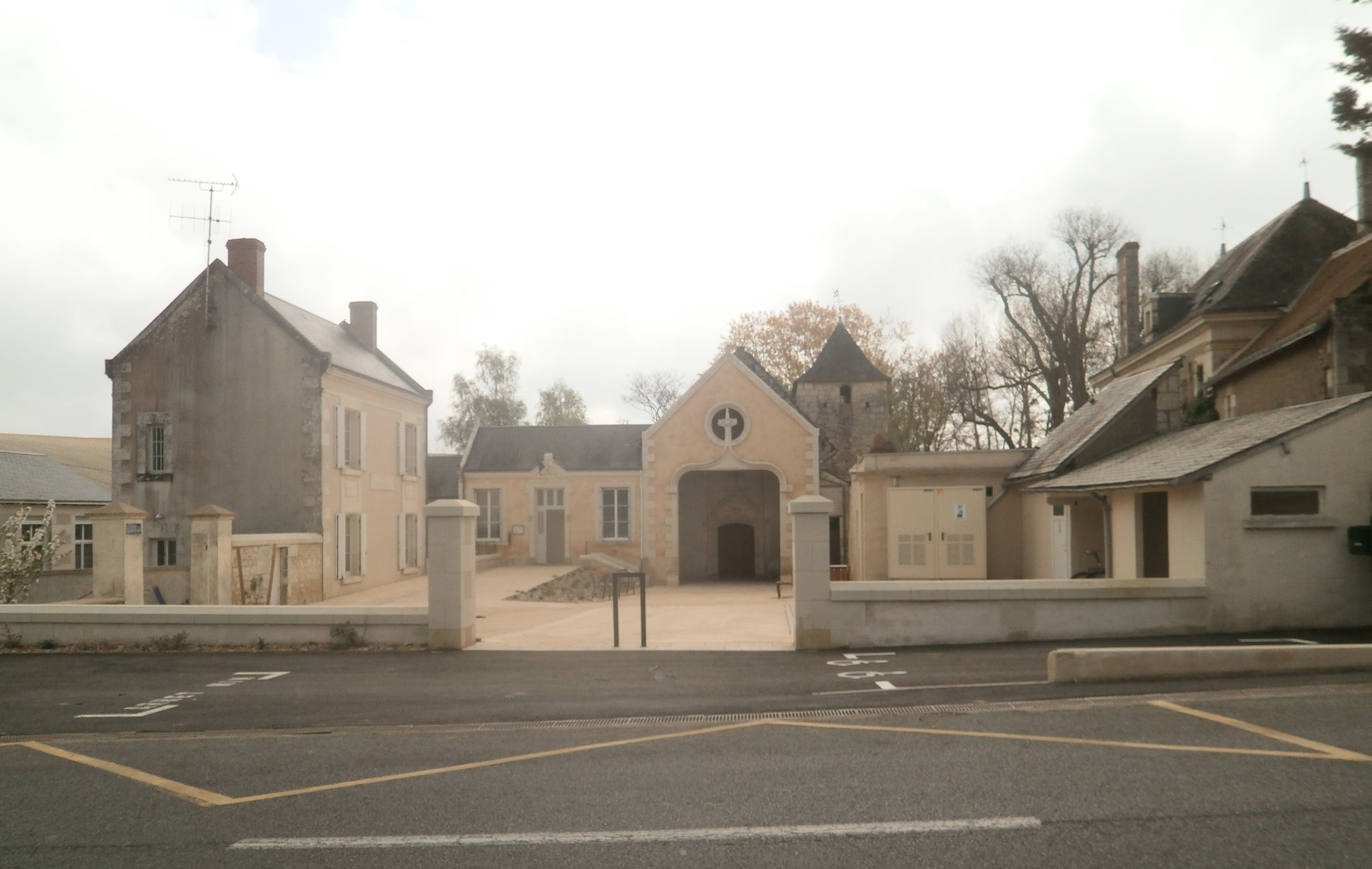 La mairie (à gauche) et l'église (à droite) de Brizay (37 - France)